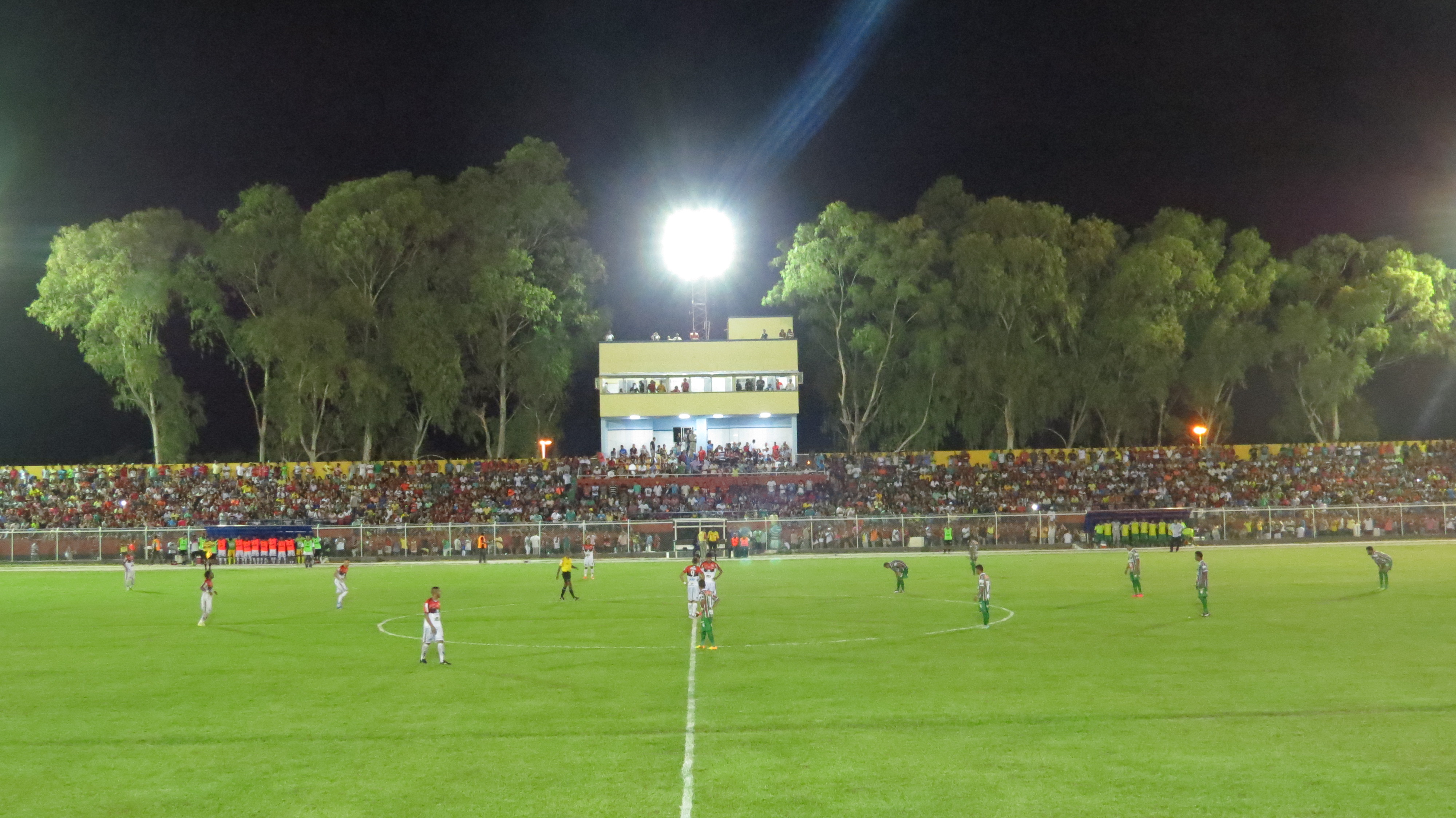 Estádio 02 de Julho Lotado